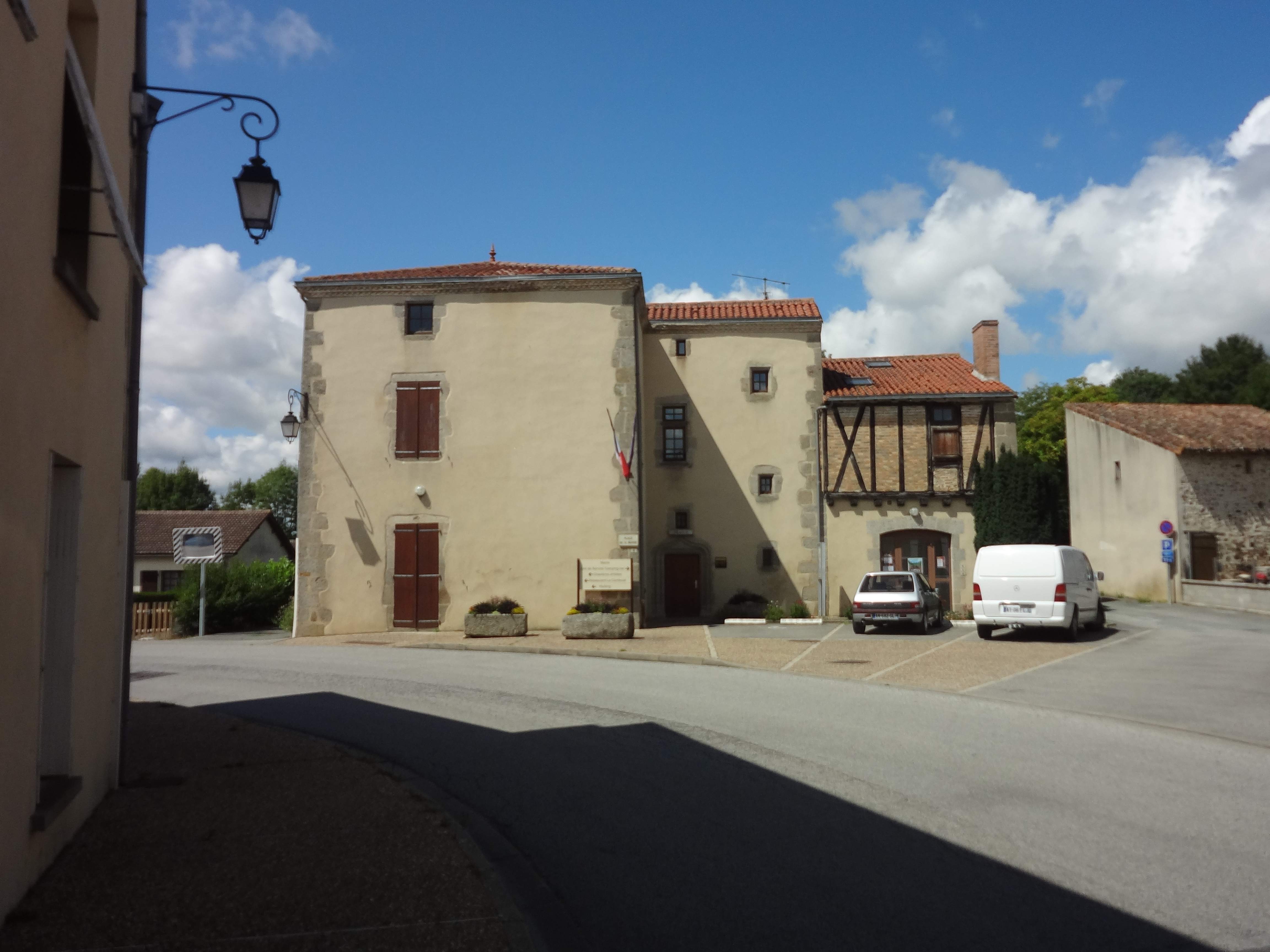 Façade de la mairie, installée dans une maison à colombages